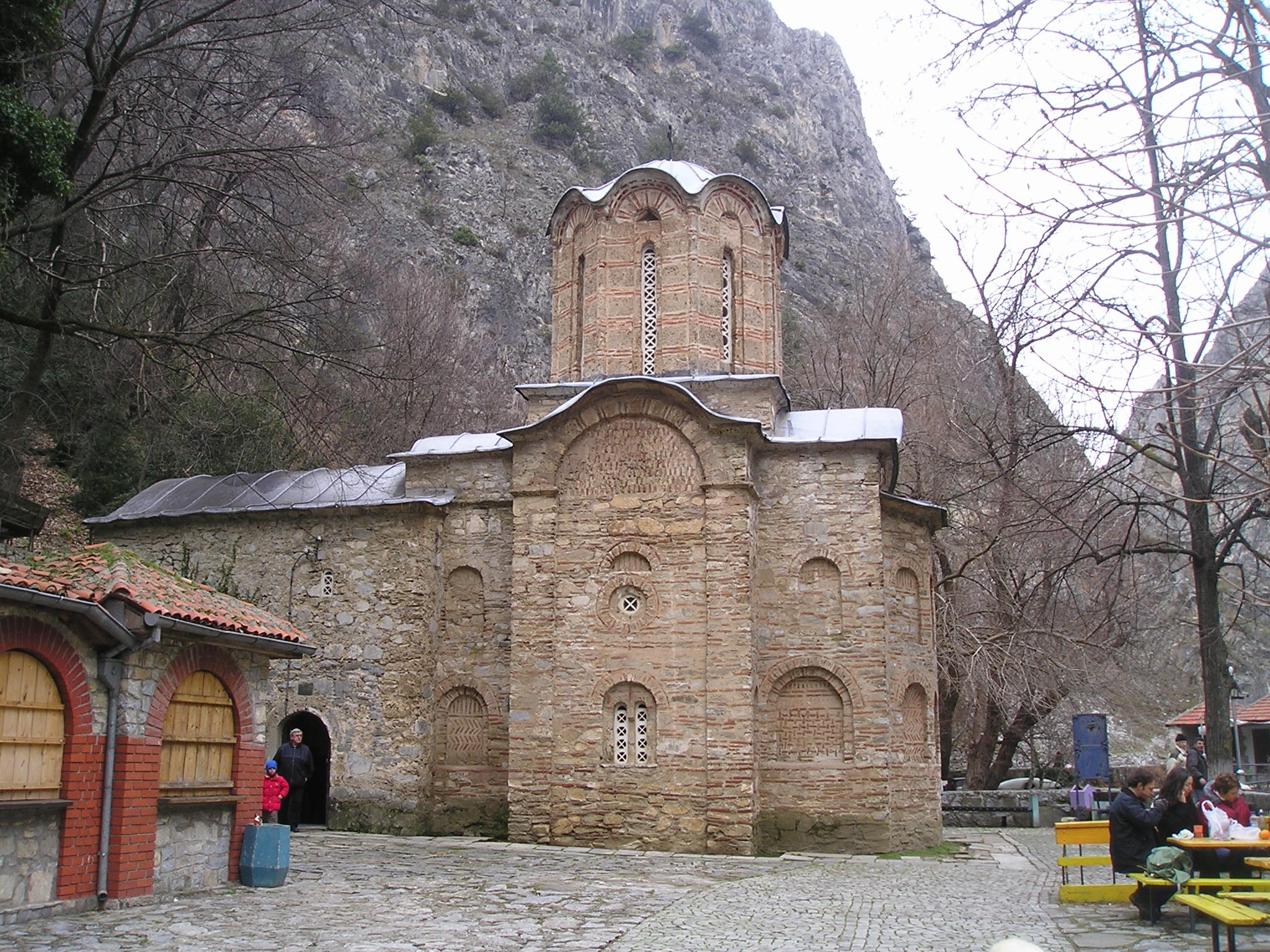 Църквата „Свети Андрей“, Матка, Република Македония. St Andrew orthodox church near Skopje, R.o.Macedonia Поглед одблизу на црквата Свети Андреја, Македонија Cerkiew św. Andrzeja koło Skopje, Macedonia